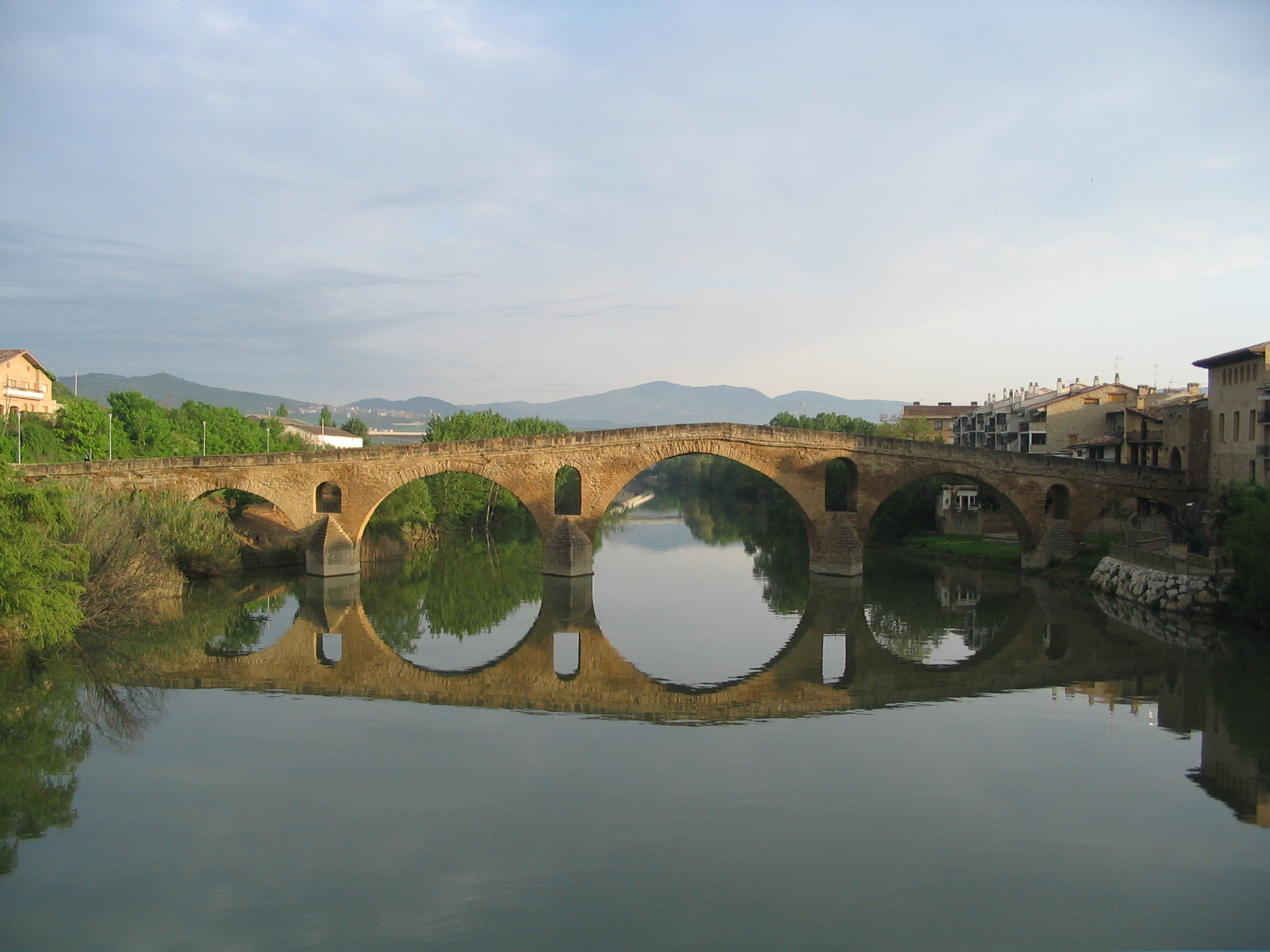 bridge in Puente la Reina, Navarra, XI century